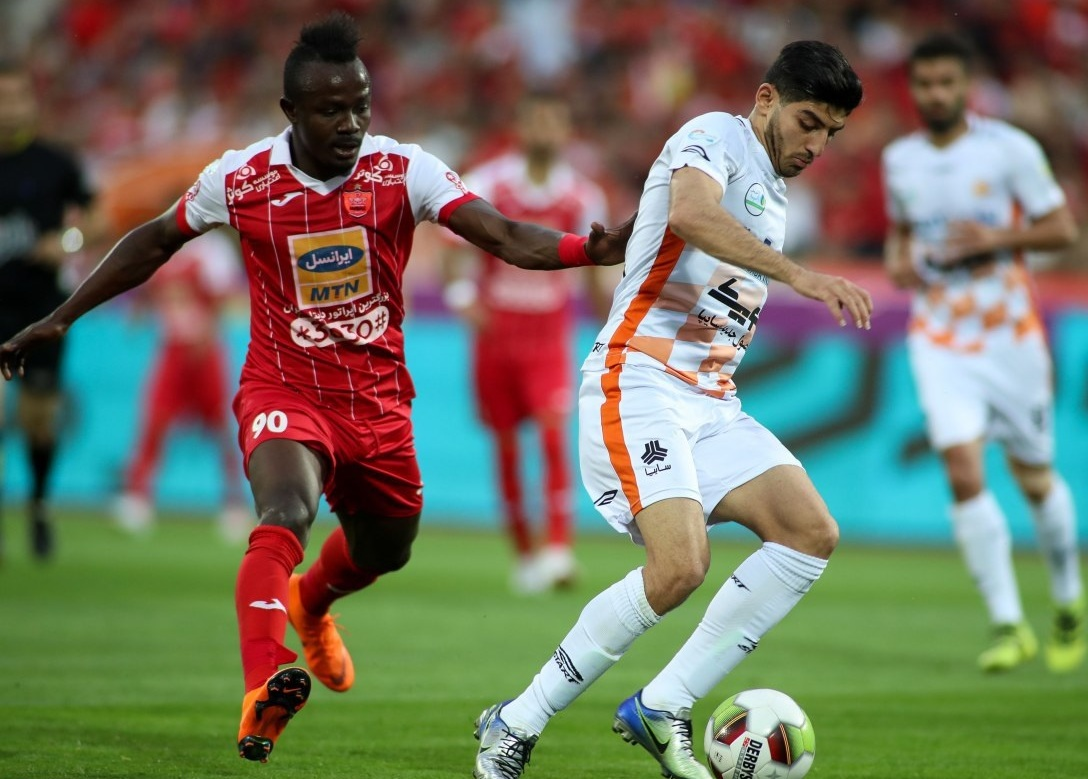 مهدی ترابی و گادوین منشا